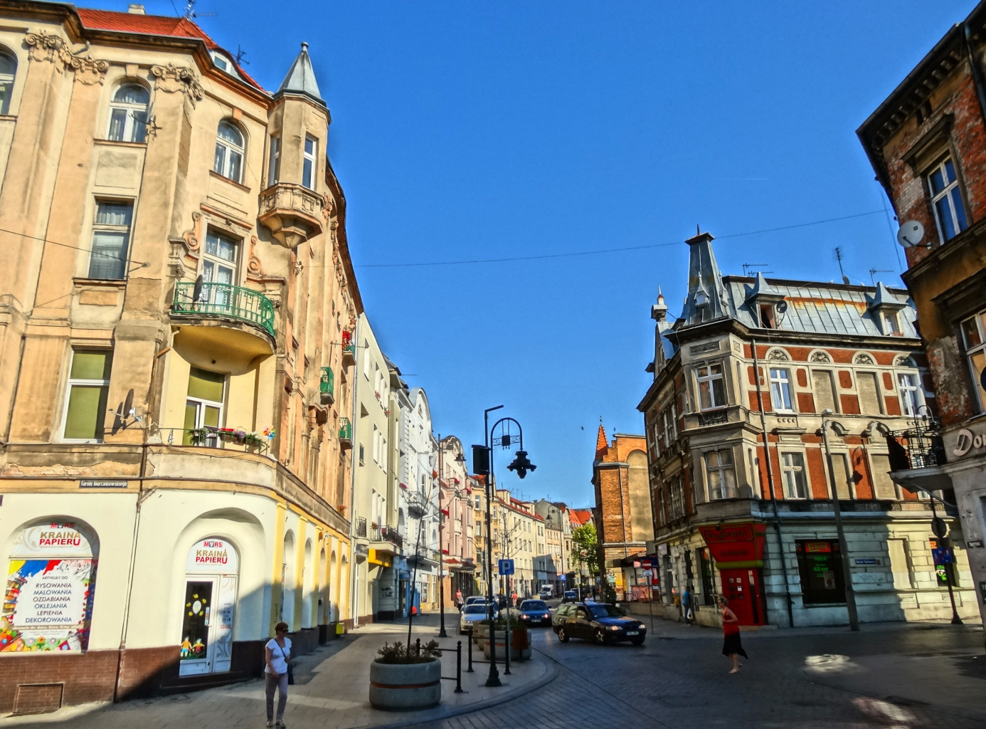 Ulica Dworcowa w Bydgoszczy w rejonie skrzyżowania z ul. Marcinkowskiego